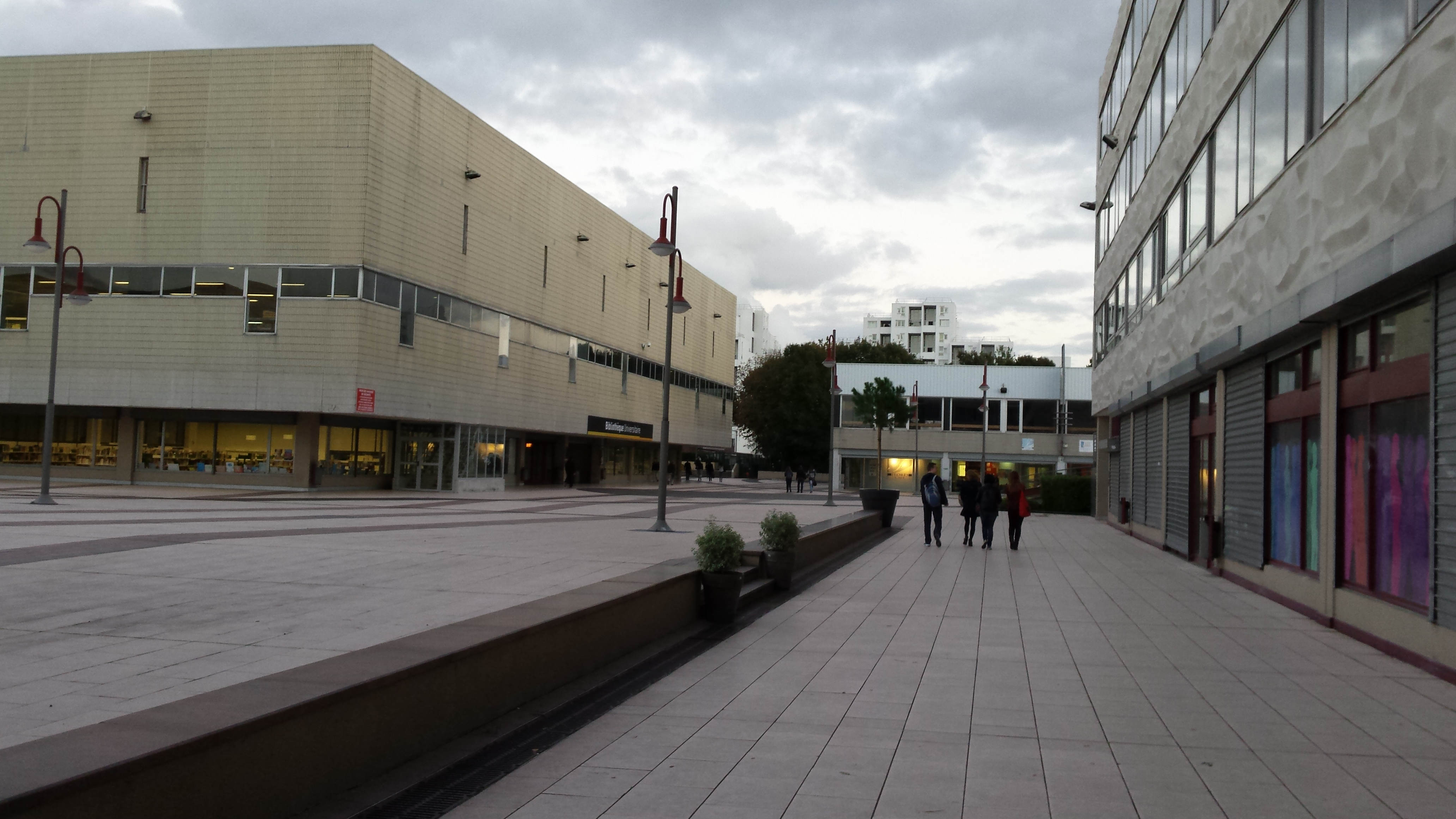 Forum de l'Université Lille III-Charles-de-Gaulle, au soir du 20 octobre 2014.